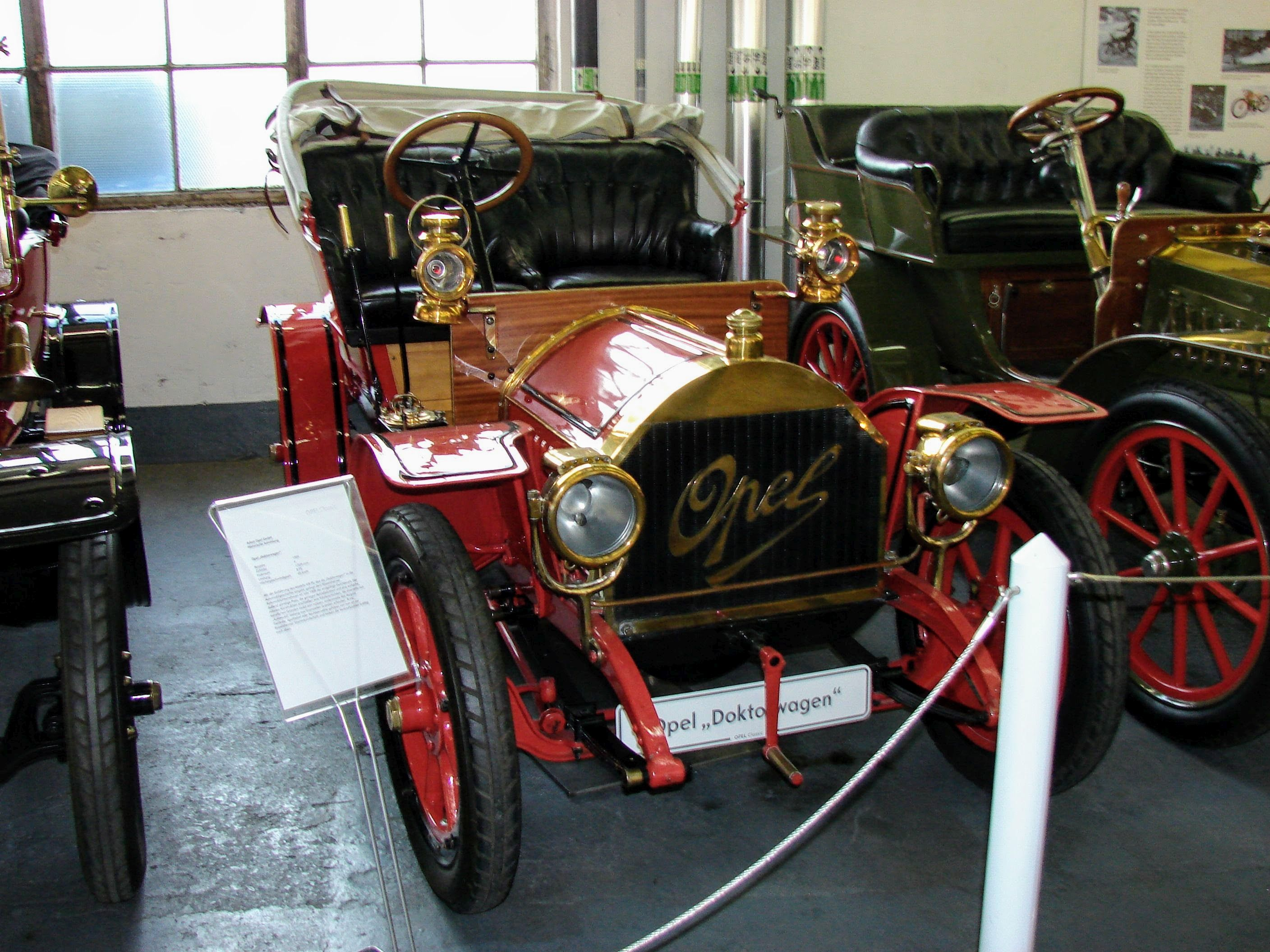 "Doktorwagen" oli selle keskklassile suunatud lihtsalt käsitletava ja seetõttu ülimalt populaarse Opeli sõiduauto rahvapärane nimetus. Dokumentides oli selle mudeli ametlik nimetus Opel 4/8 PS.